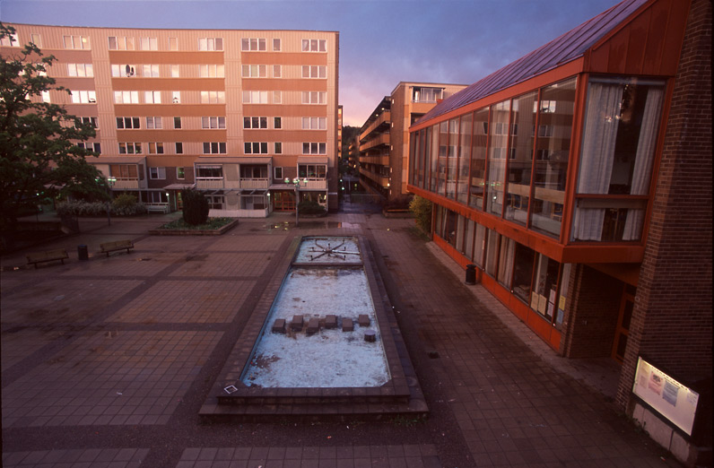 Fisksätra torg, Nacka, 2004. Regnmolnet har precis passerat. Foto: Sebastian Vidovic